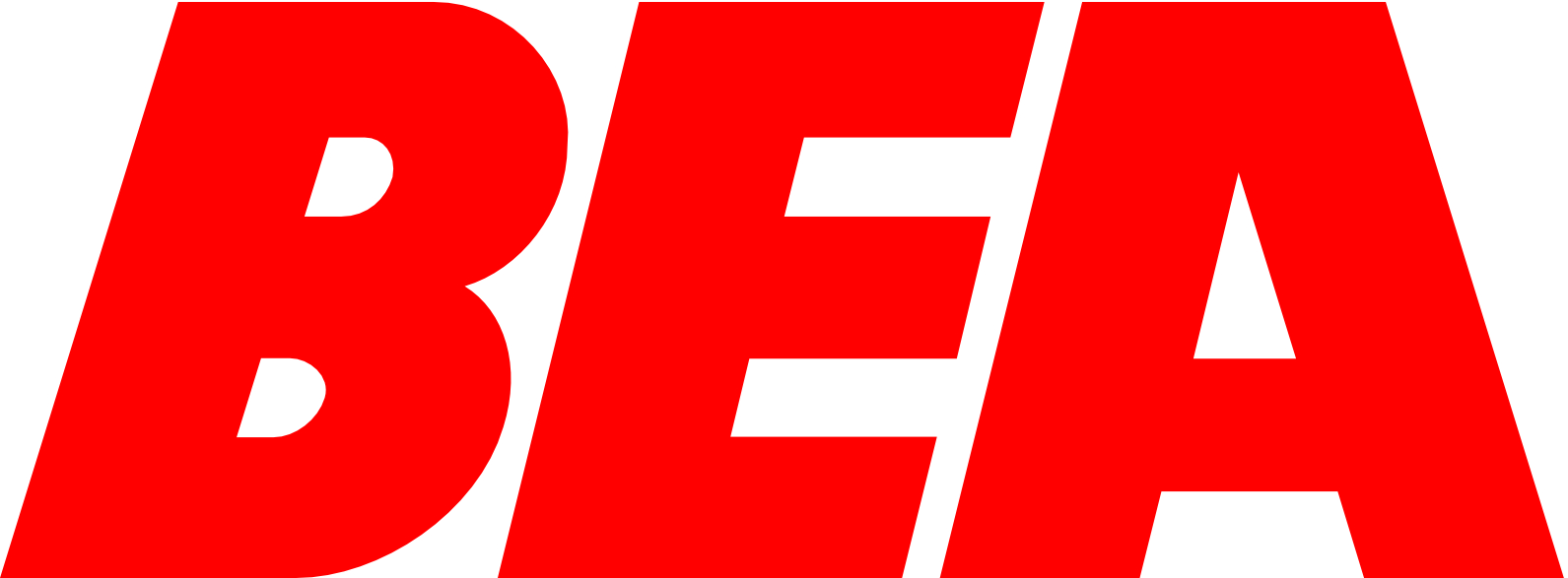 Logo der BEA